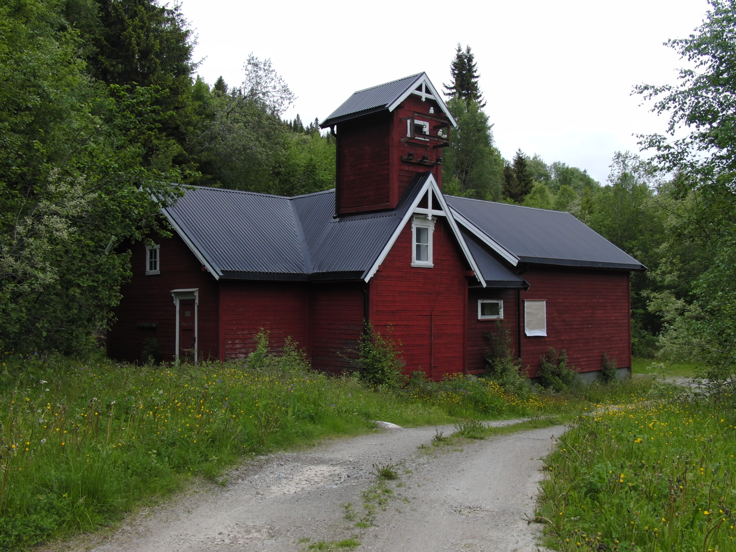 Malmo elektrisitetsverk